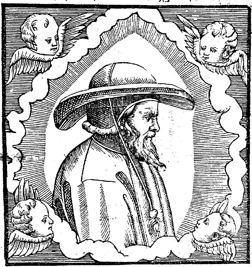 Αλέξανδρος Ραρτούρος, Griechischer Gelehrter, 16. Jahrhundert